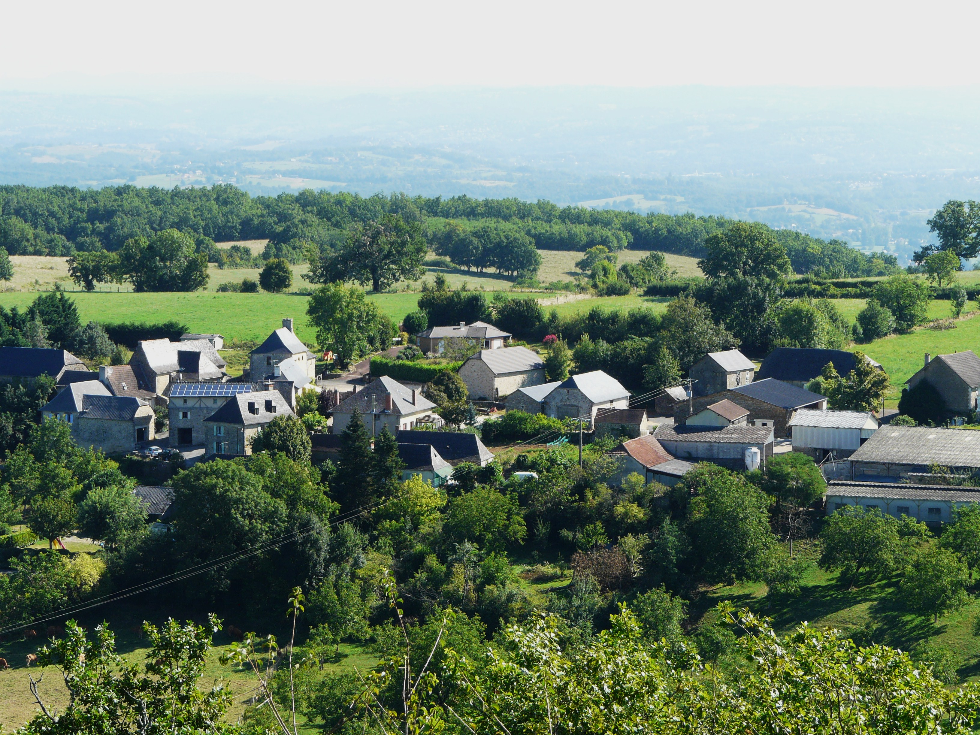 Le village de Jaf, Grèzes, Dordogne, France.